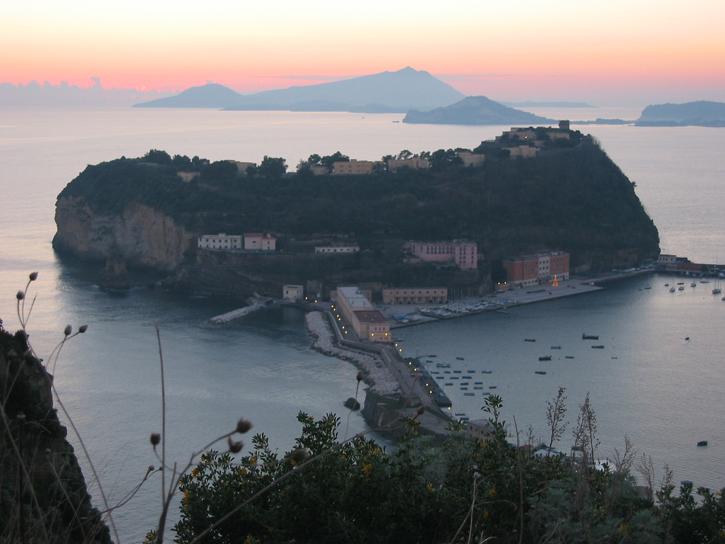 Nisida al tramonto dal parco della Rimembranza